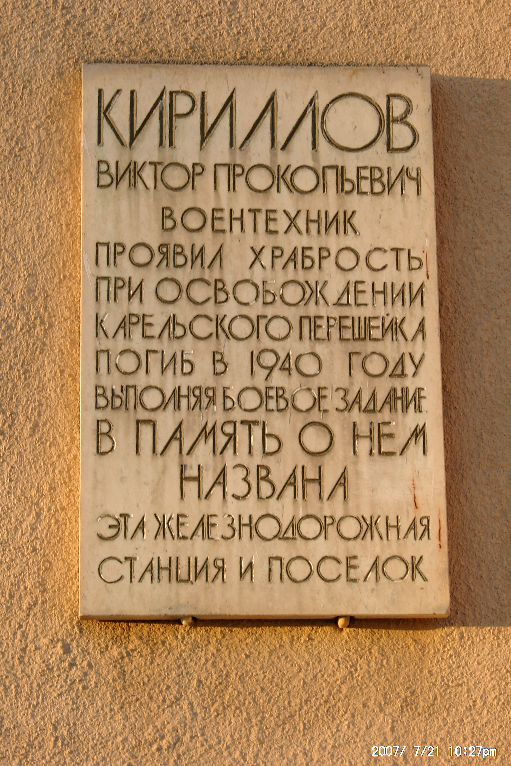 Мемориальная доска советскому воентехнику В.П.Кириллову, погибшему в 1940 г. во время советско-финской войны, на железнодорожной станции его имени